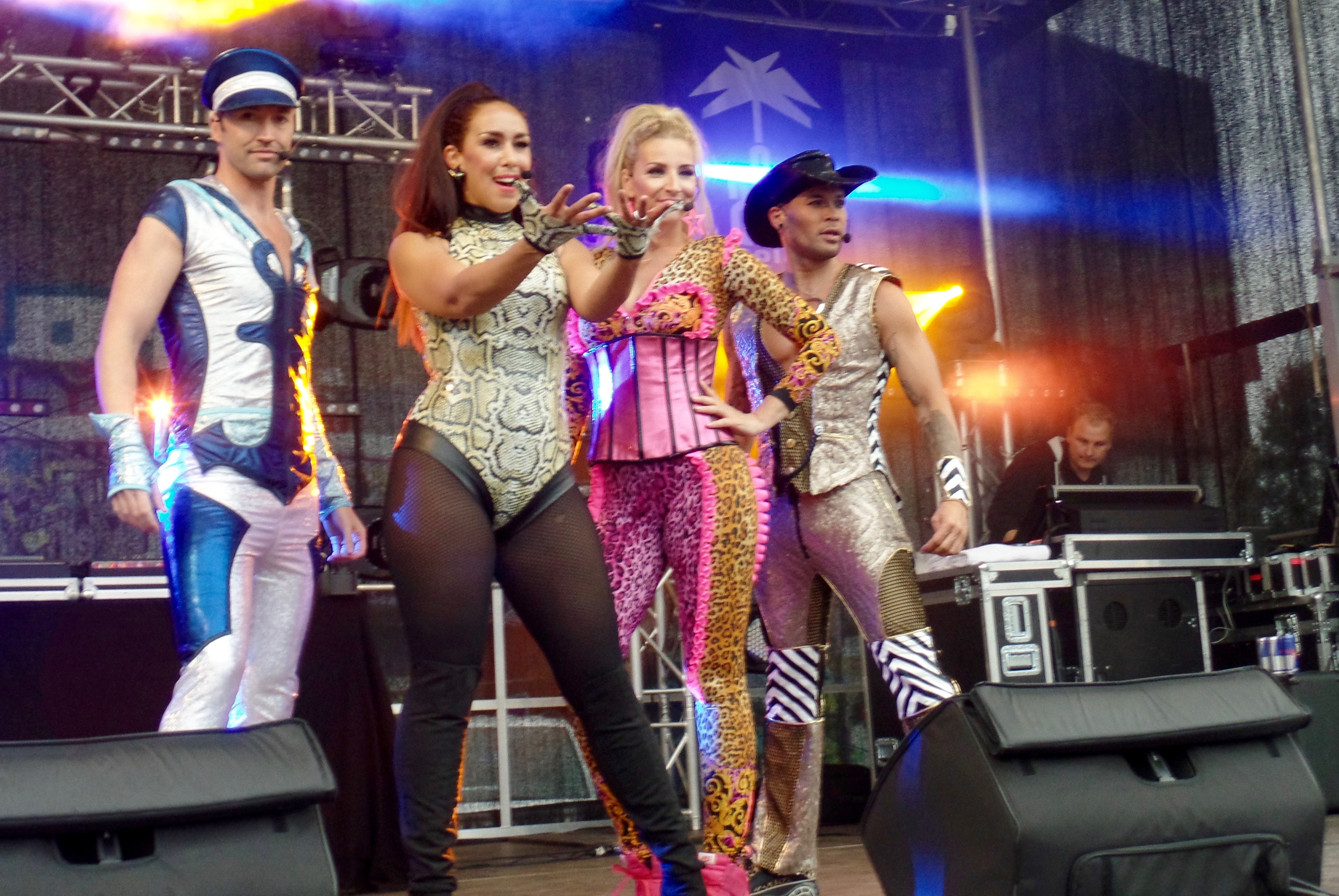 The 90s Open Air mit den Vengaboys und Captain Hollywood Project auf dem Utkiek in Oldenburg am 12. August 2016.